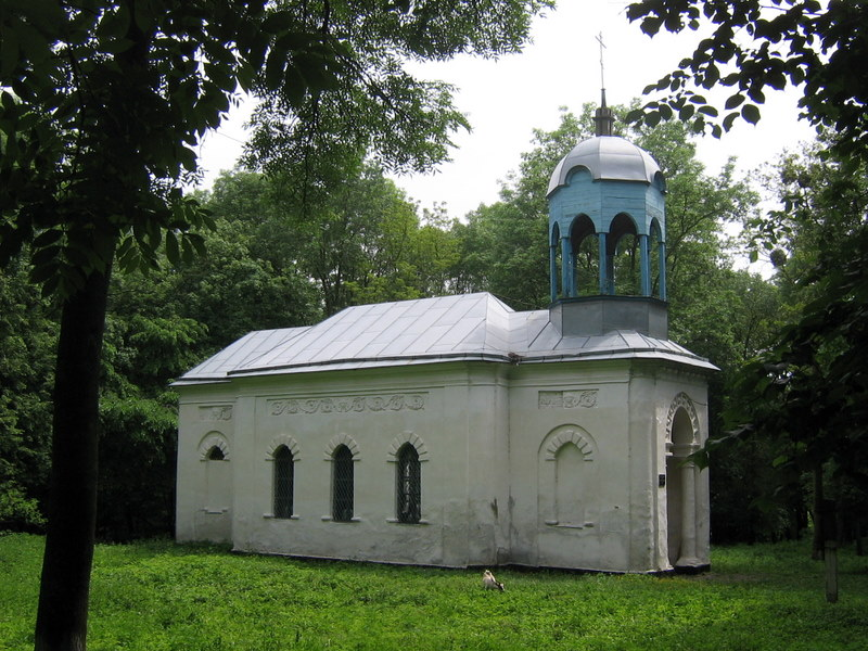 сімейна усипальниця